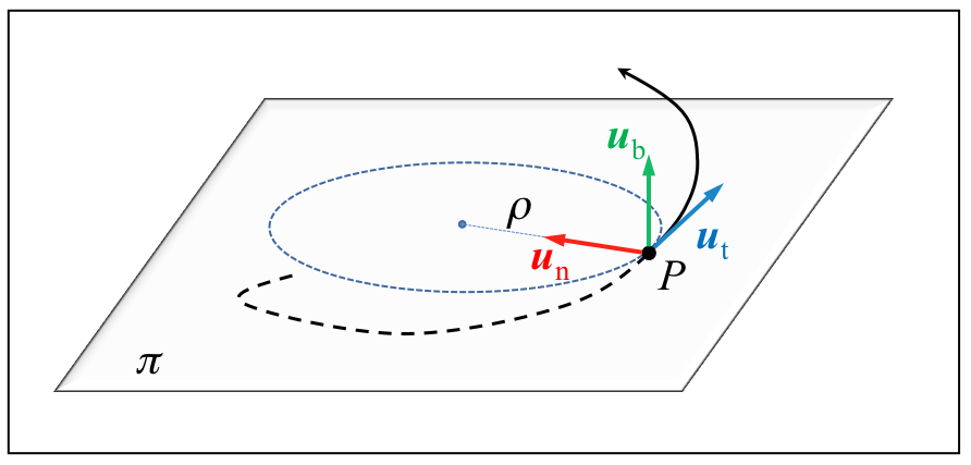 Frenet-en erreferentzia-sistemako hiru bektore unitarioen irudia.